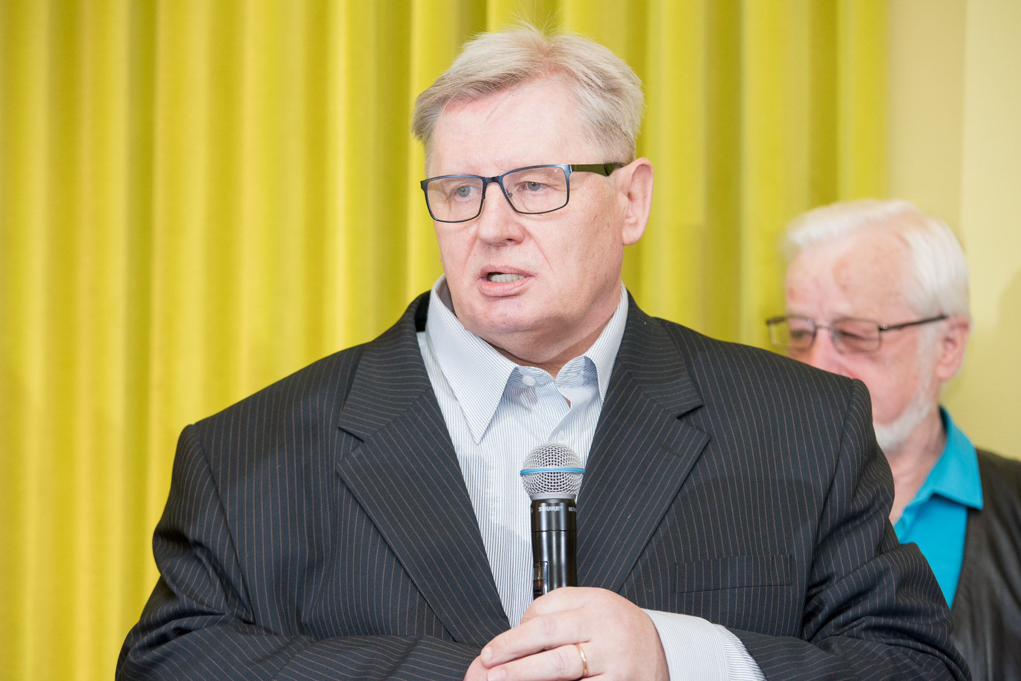 Raivo Palmaru, endine kultuuriminister. Kultuuriministeeriumi 65. aastapäev